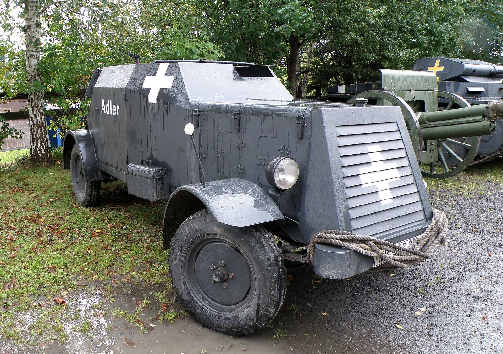 Adler Kfz.13 w czasie rekonstrukcji bitwa pod Łomiankami w 2011